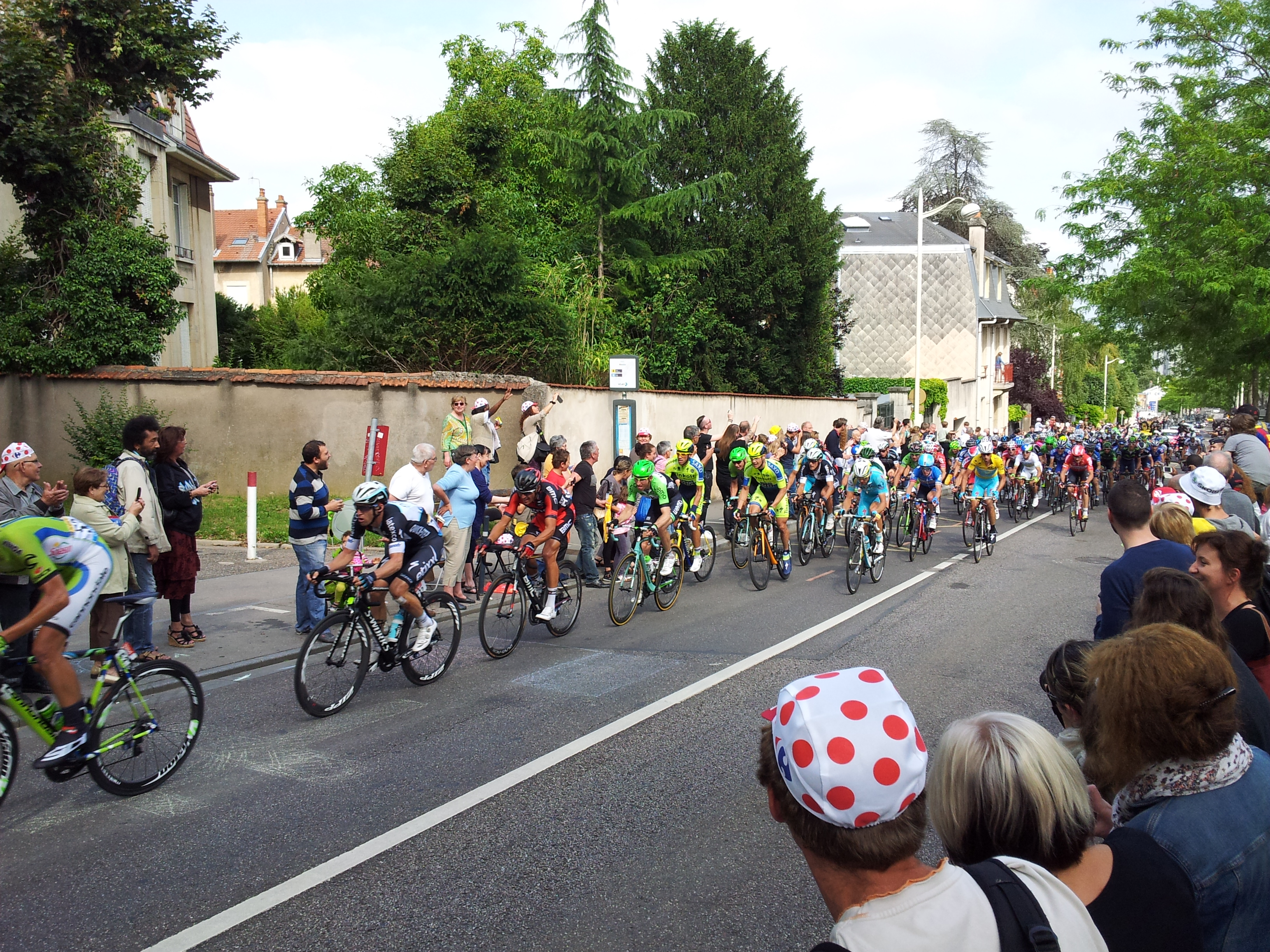 7e étape du Tour de France 2014 au début de la côte de Boufflers.